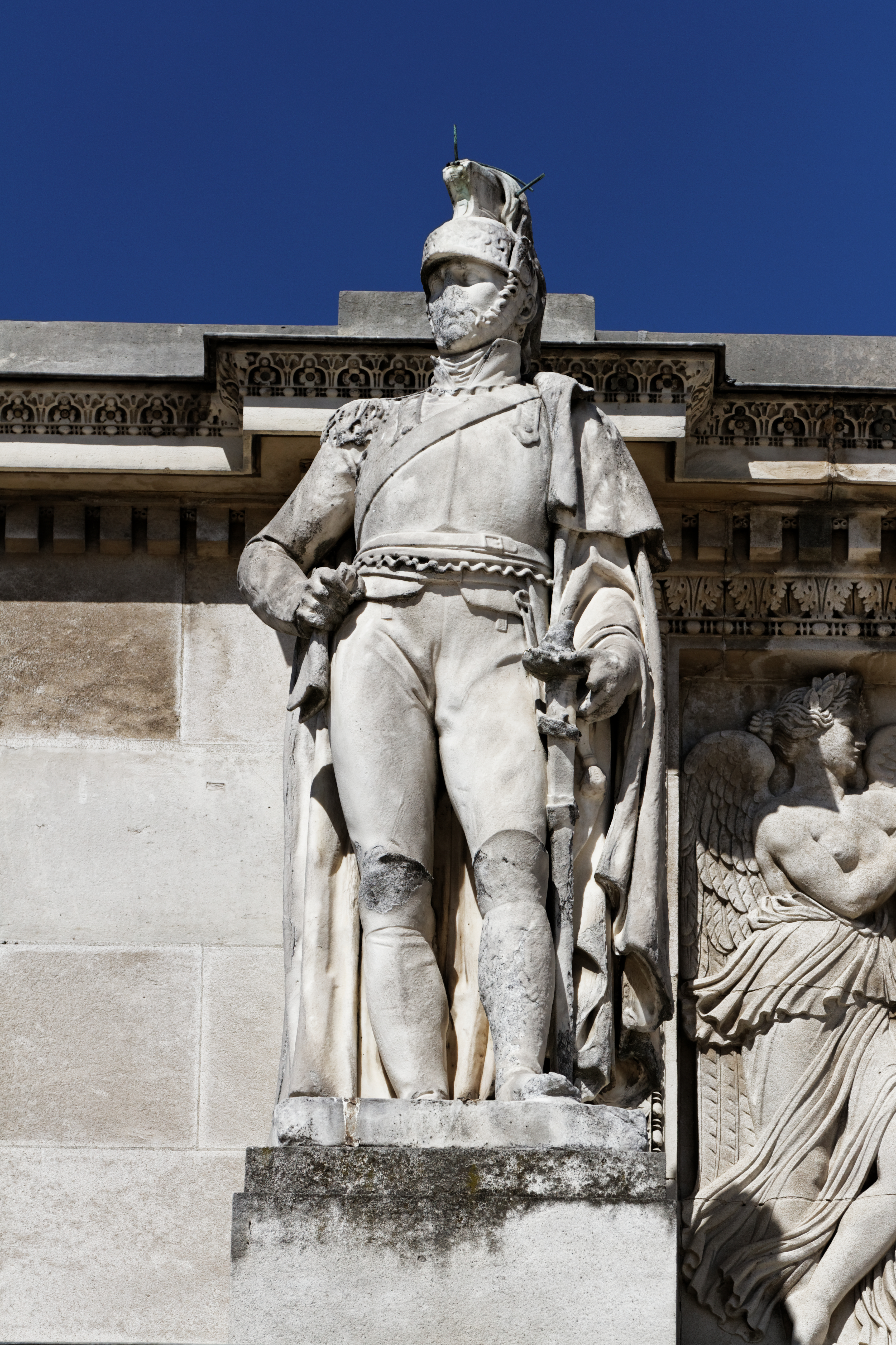 L'arc de Triomphe du Carrousel à Paris.